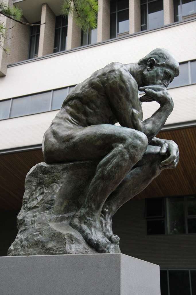 The Thinker in National Tsing Hua University Library.